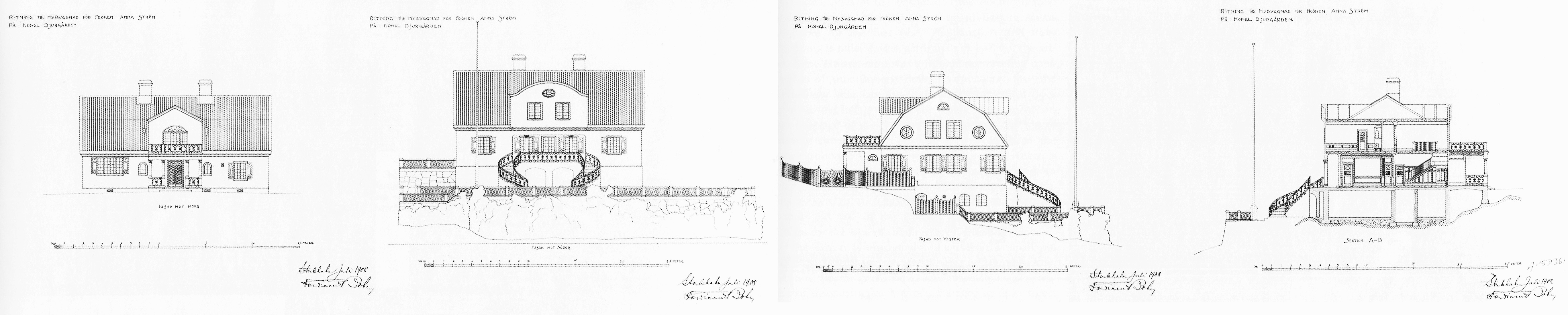 Bobergs ritningar till Villa Bergsgården